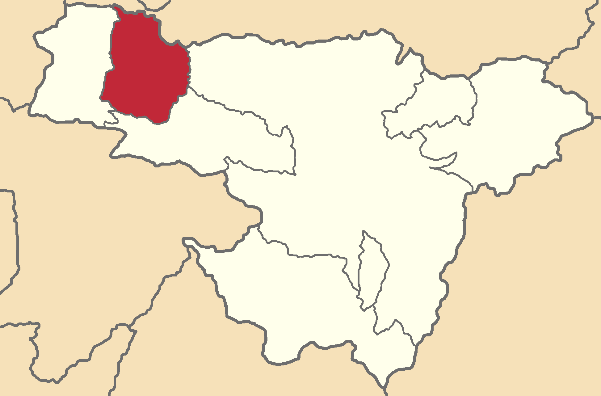 Mapa localizador del cantón en Pichincha, Ecuador